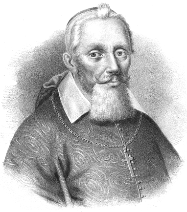 Zbigniew Oleśnicki primate of Poland